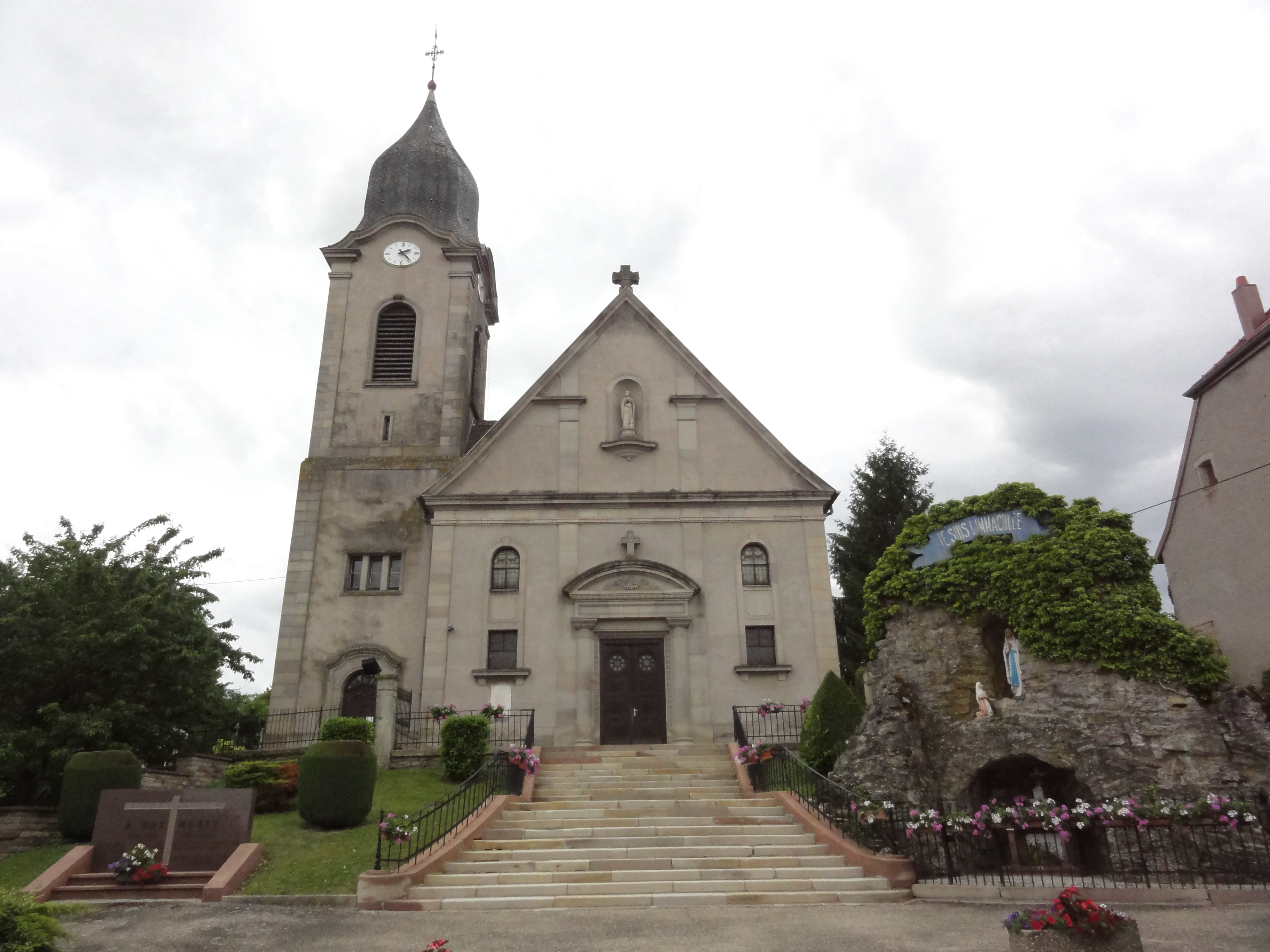 Plaine-de-Walsch (Moselle) église